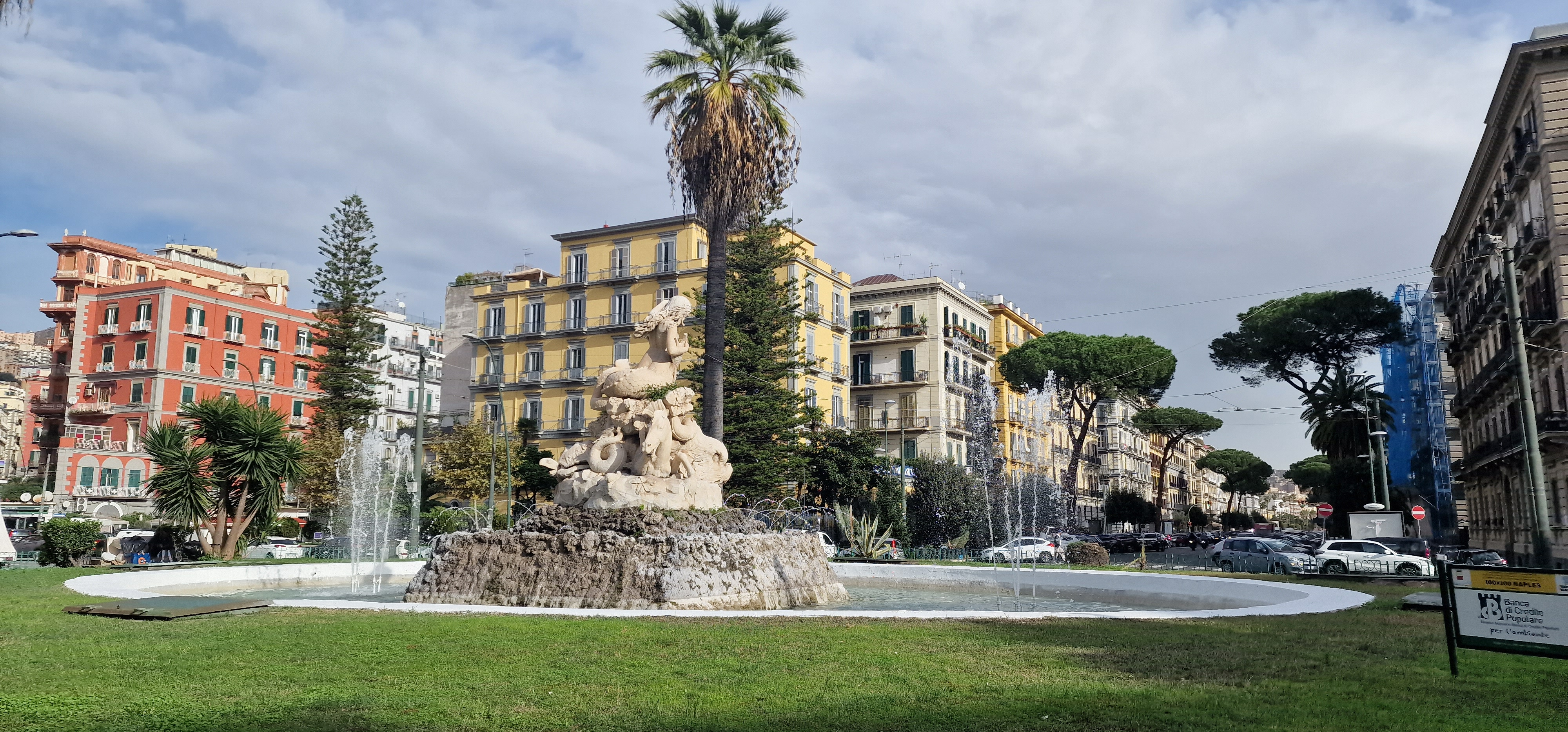 Viale Elena (Napoli)